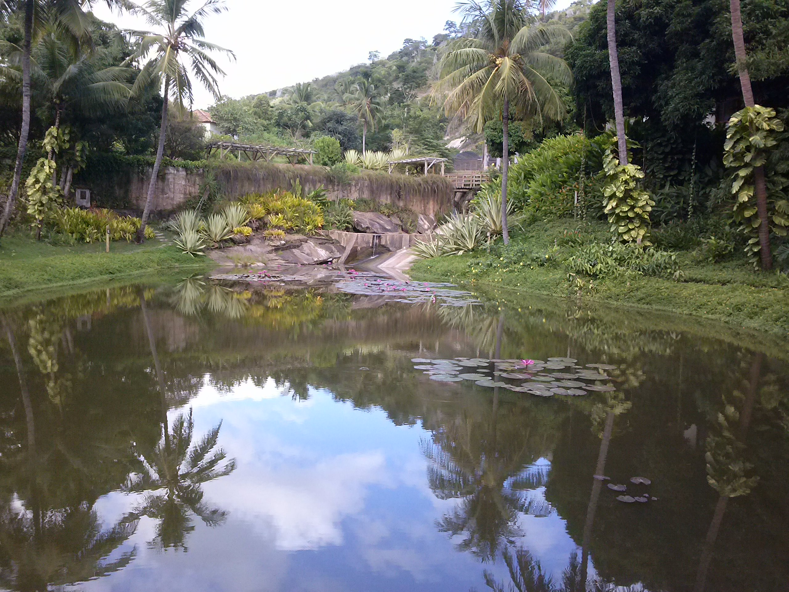 Visita ao instituto Terra de Sebastião Salgado.